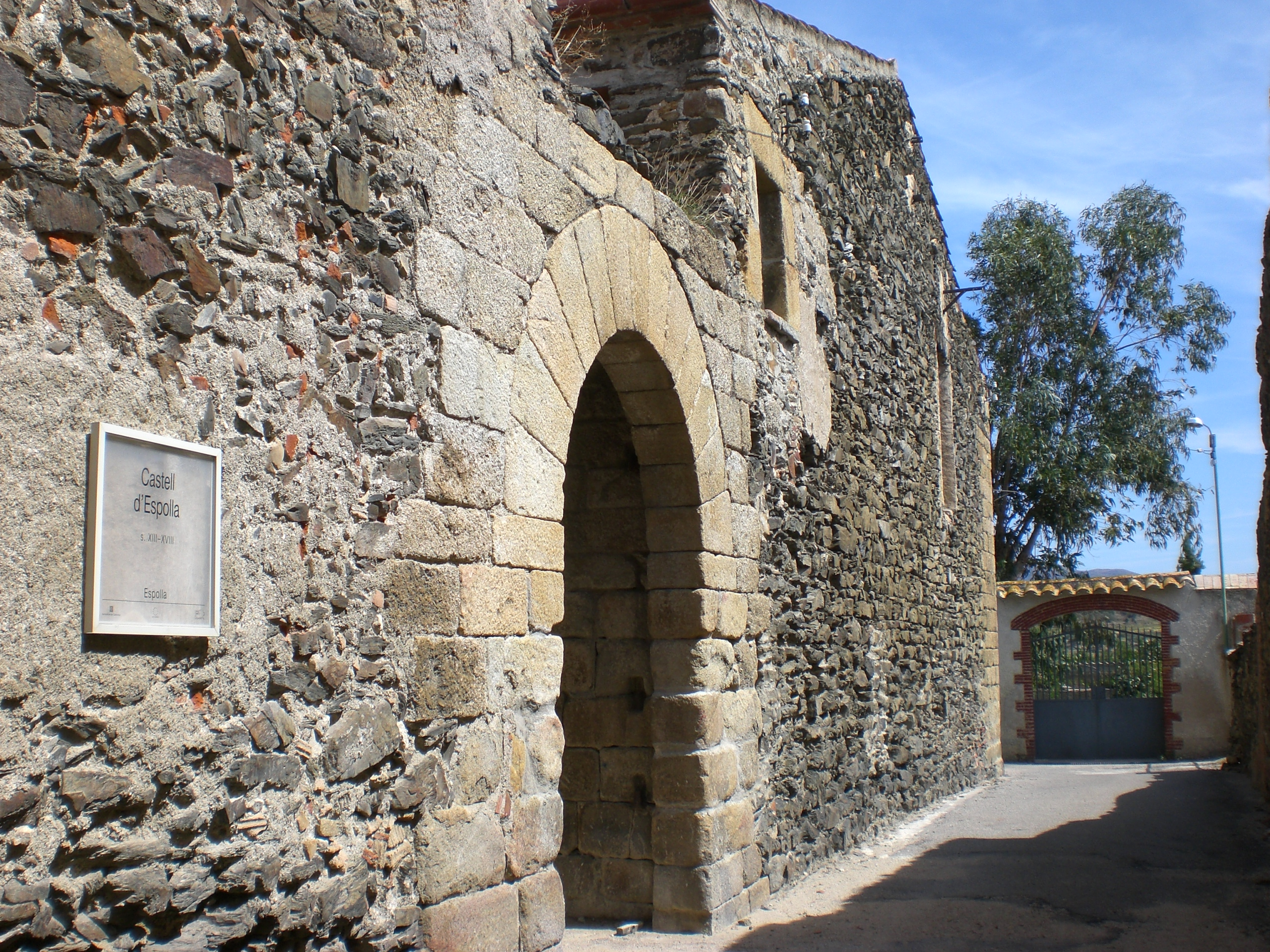 Aragonés: Portalada d'o castiello d'Espolla.